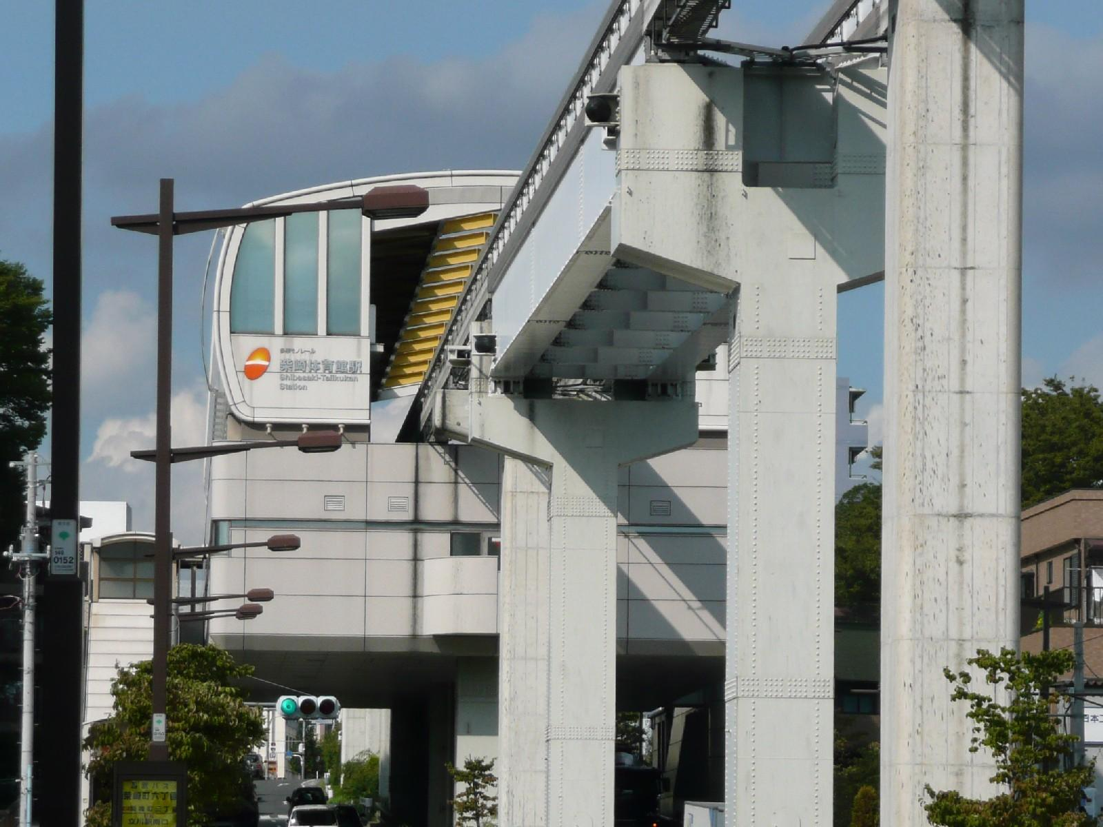 柴崎体育館駅